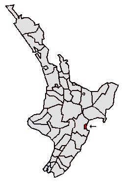 Die Karte zeigt die Lage des Napier City Council auf der Nordinsel Neuseelands rot